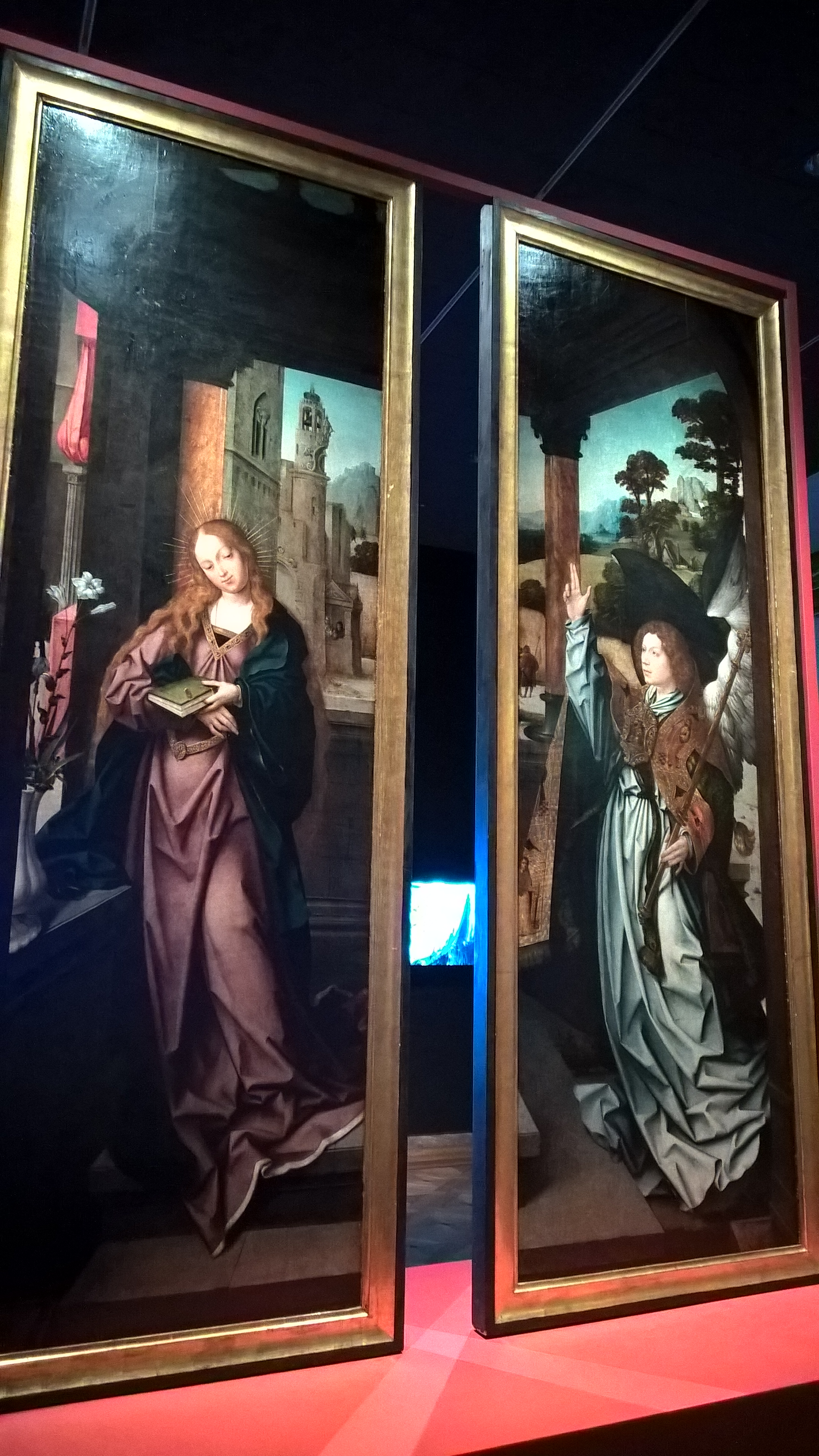 Anunciação reverso dos volantes do Tríptico da Matriz da Calheta, na ilha da Madeira, de cerca de 1525-29, presumivelmente do pintor flamengo Jan Provoost